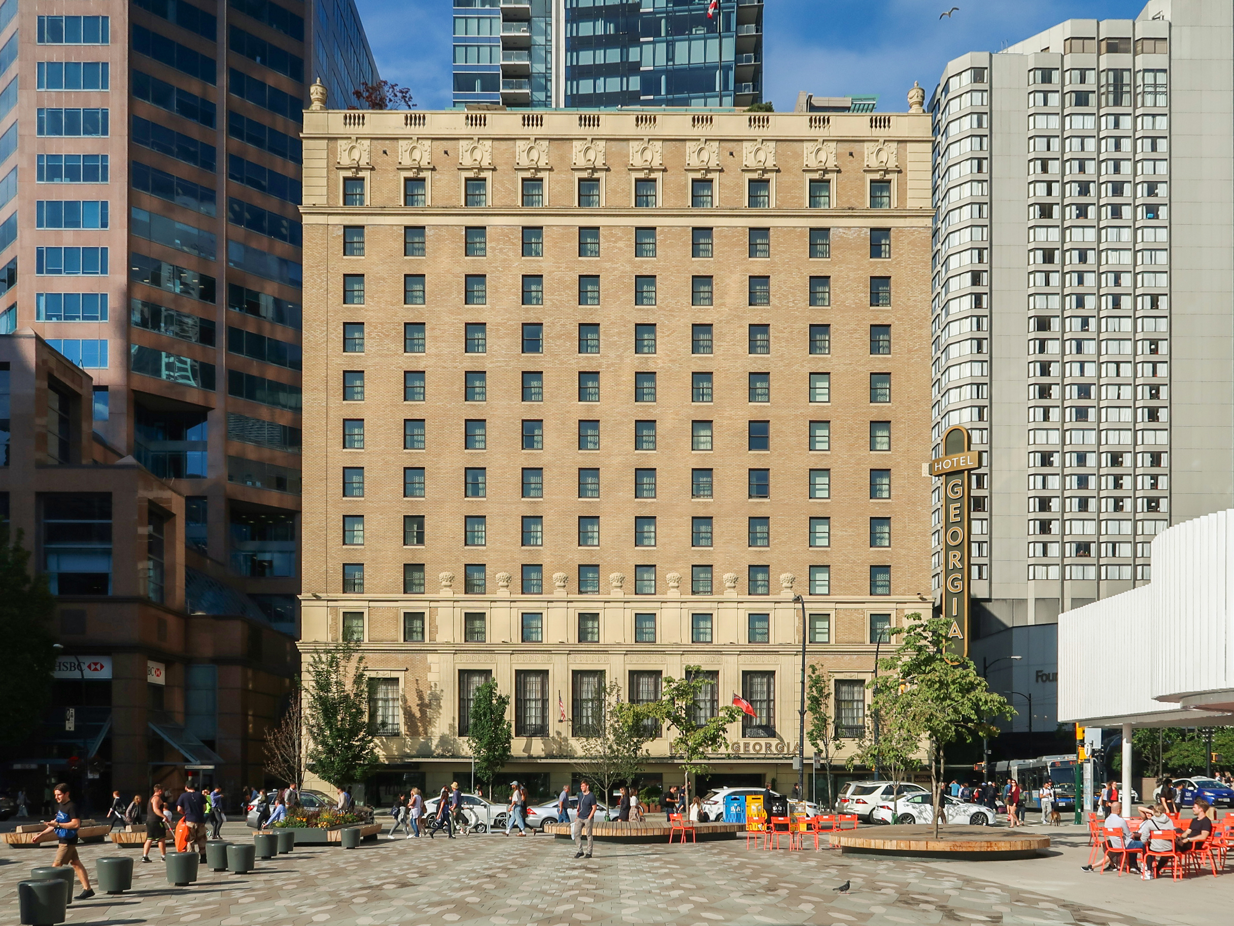 Rosewood Hotel Georgia